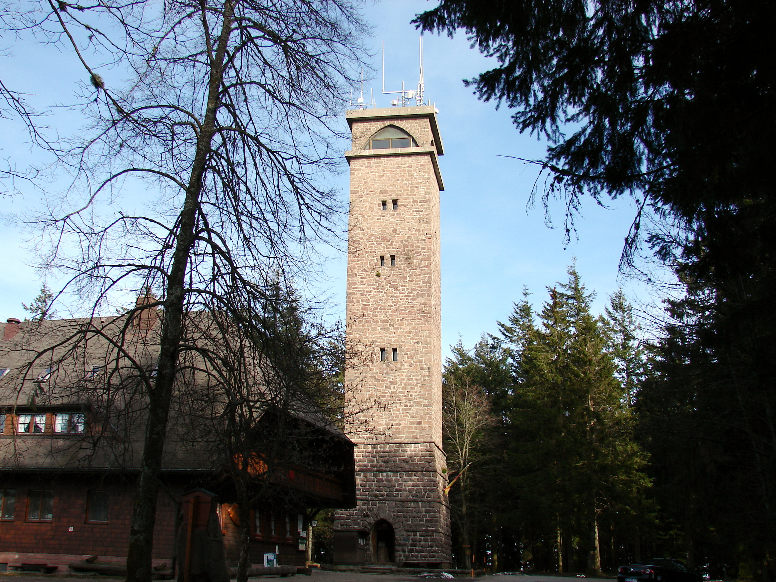 Seit 1929 existiert der 29 m hohe Brandenkopfturm, ein steinerner Aussichtsturm, der einen weiten Ausblick auf die Landschaft des Schwarzwaldes bietet, an klaren Tagen sogar bis zu den Alpen, Vogesen und Schwäbischen Alb.